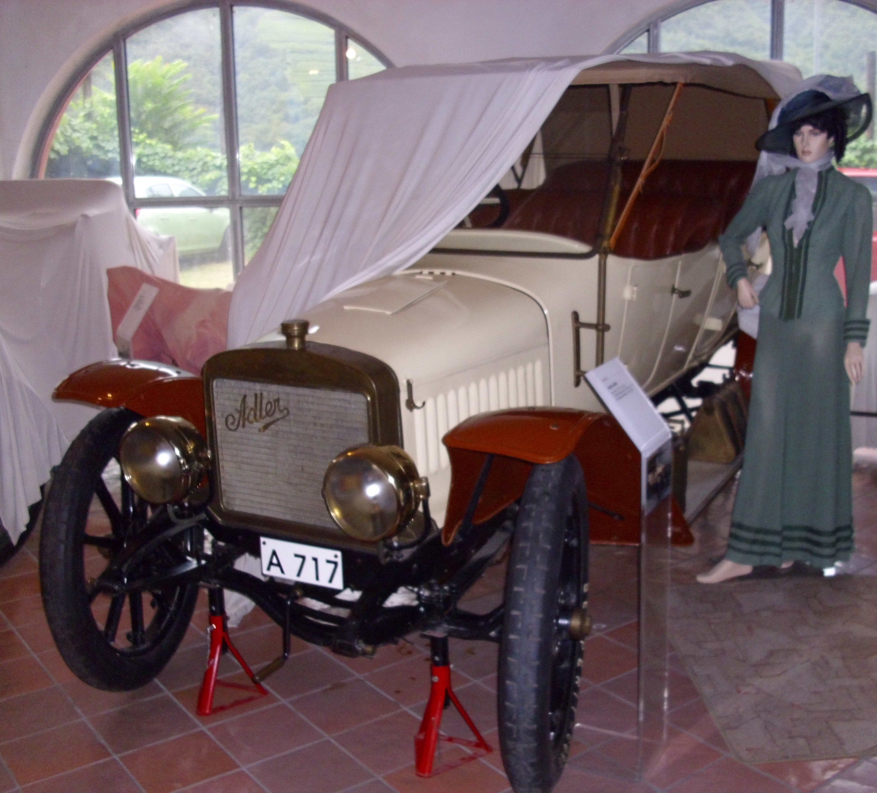 Austro-Adler 7/17 PS von 1912 in der Sammlung Max Reisch